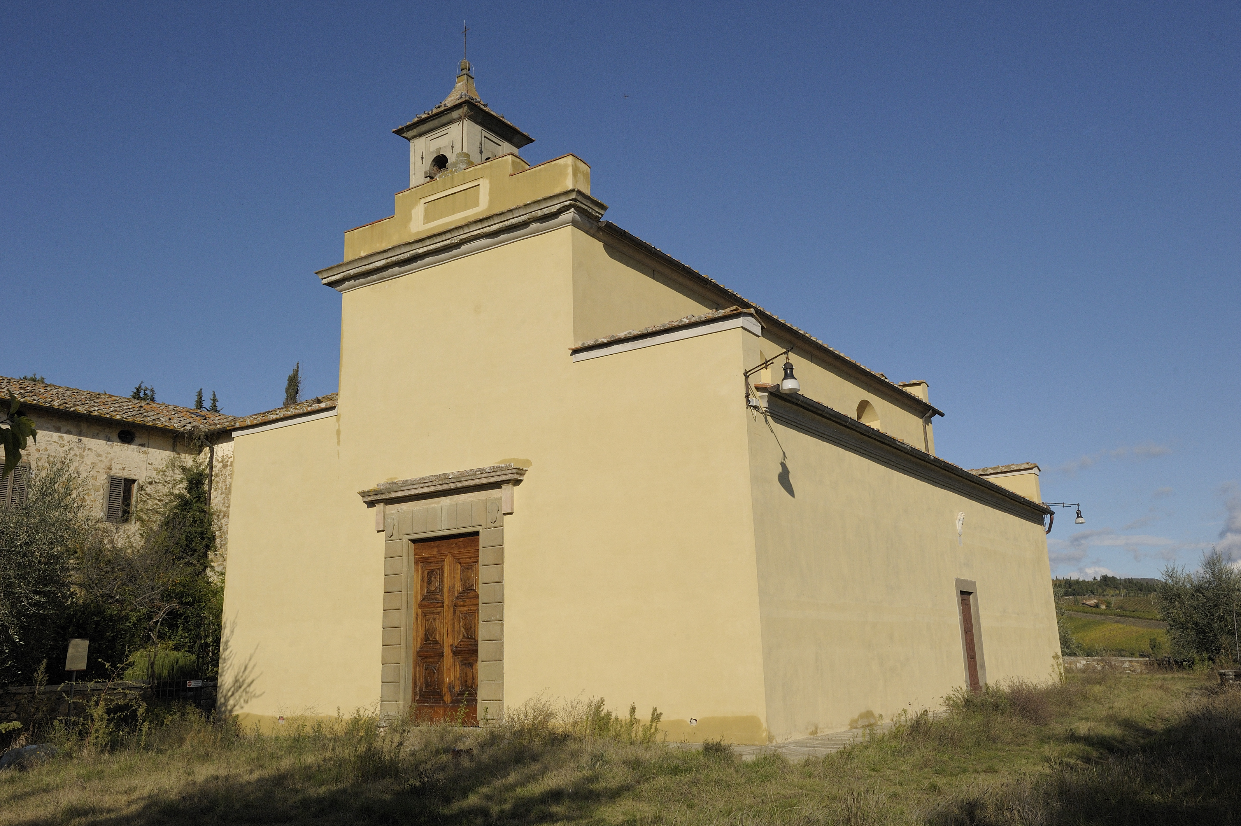 Facciata della Pieve di Santa Maria Novella in Chianti